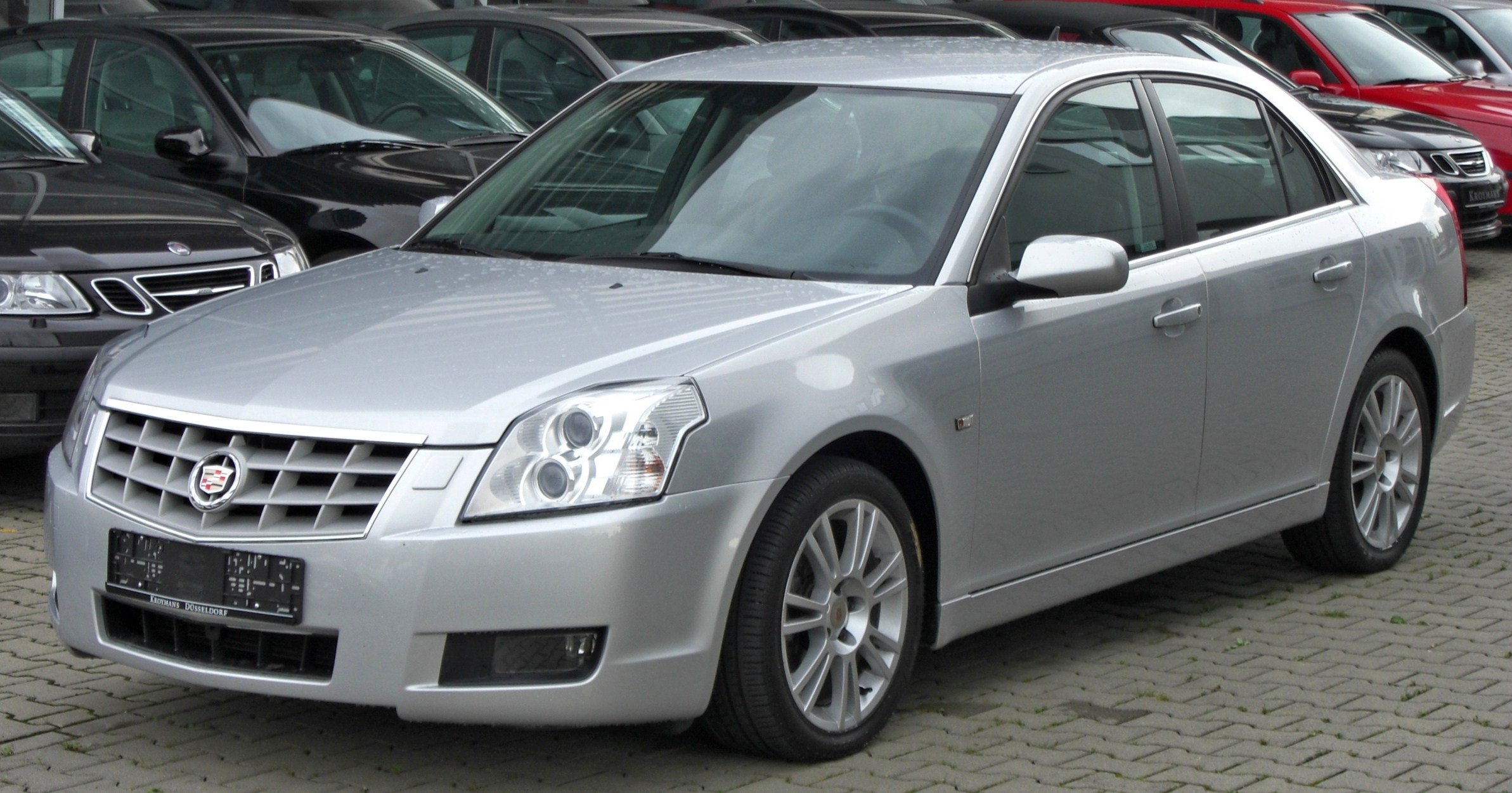 Cadillac BLS